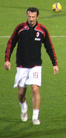 Giuseppe Favalli